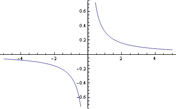 filtro de Hilbert en el tiempo